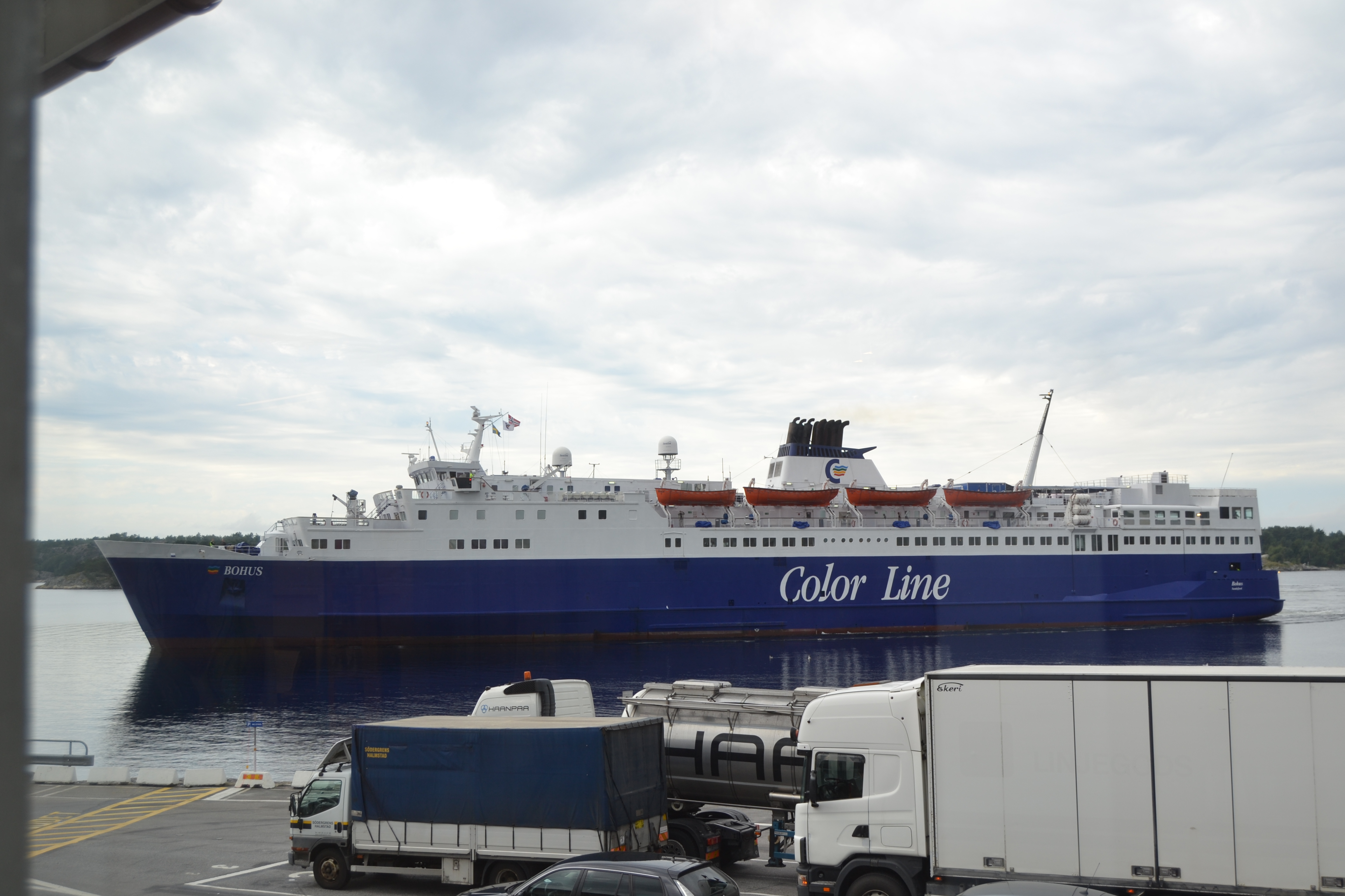 Bohus i Strömstad